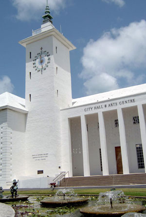 City Hall Hamilton (Bermuda)